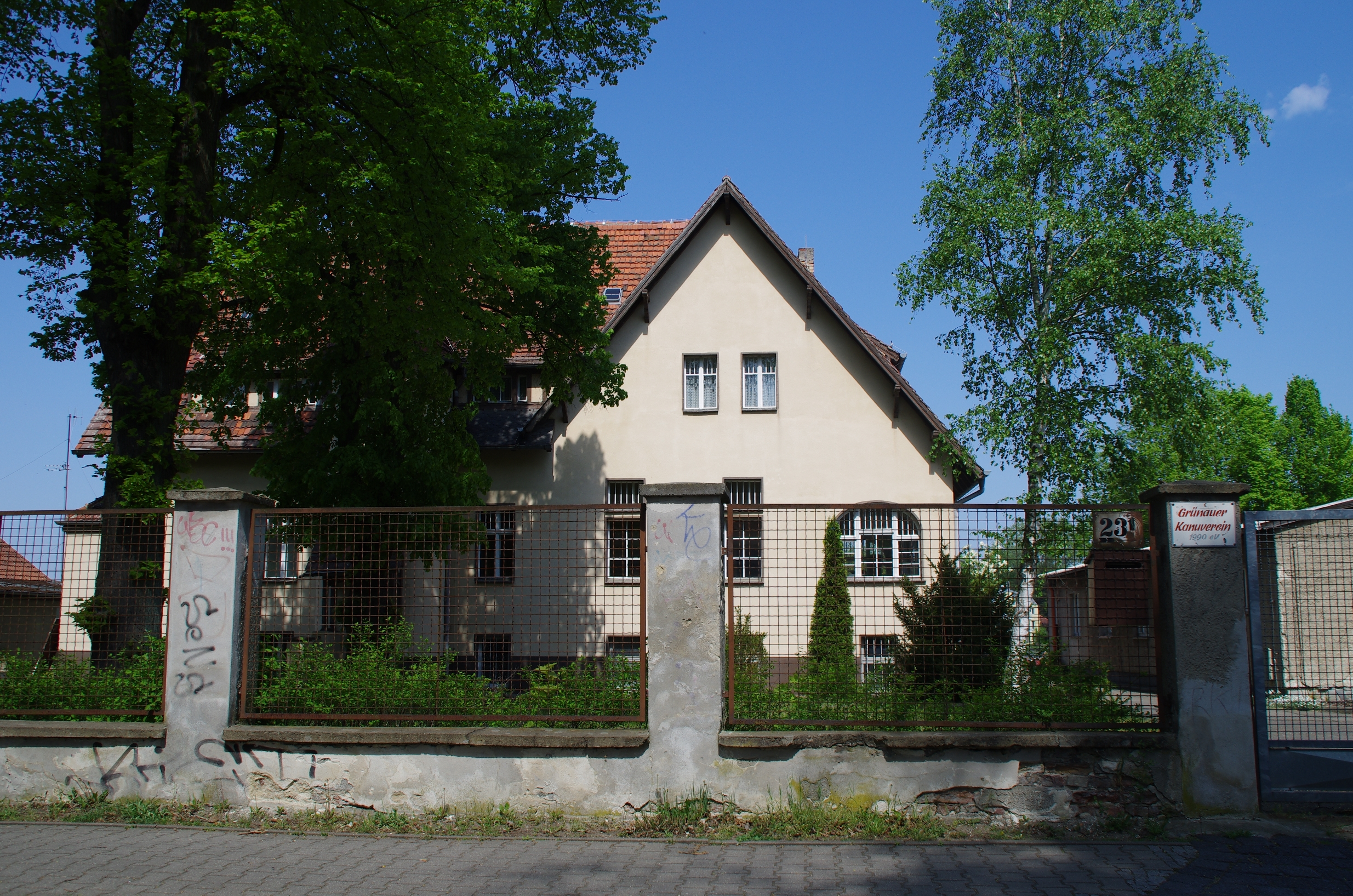 Berlin-Grünau. Das Haus in der Regattastraße 231 steht unter Denkmalschutz.